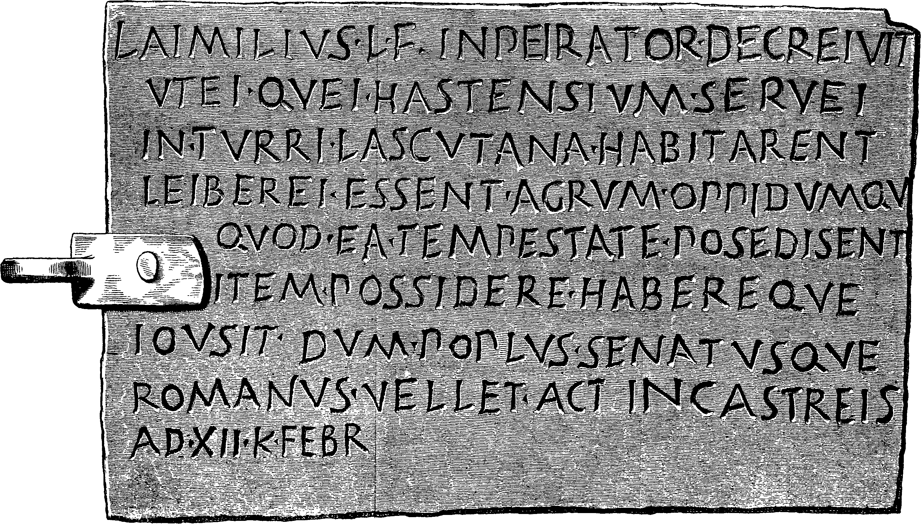 Illustration from Hermes. Zeitschrift für classische Philologie 3 (1869)